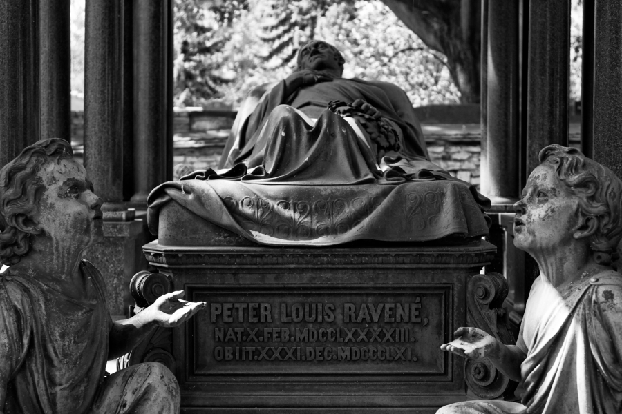 Grabmal für Peter Louis Ravené auf dem I. Friedhof der französischen Gemeinde in Berlin, Oranienburger Vorstadt, Chausseestraße; um 1861 von Architekt Friedrich August Stüler und Bildhauer Gustav Blaeser